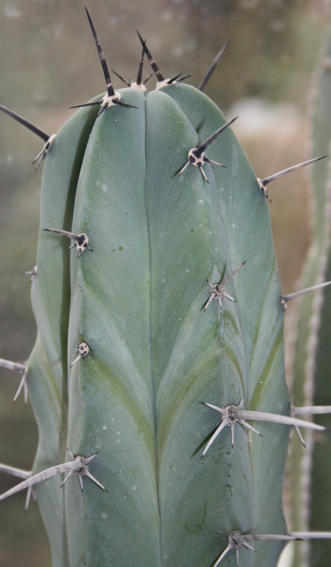 Myrtillocactus geometrizans (Cactaceae) fiatal hajtása